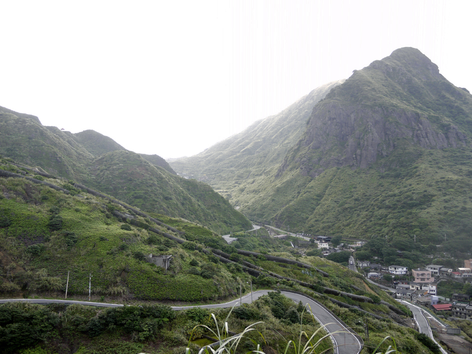 基隆山與十三層選銅廠煙管